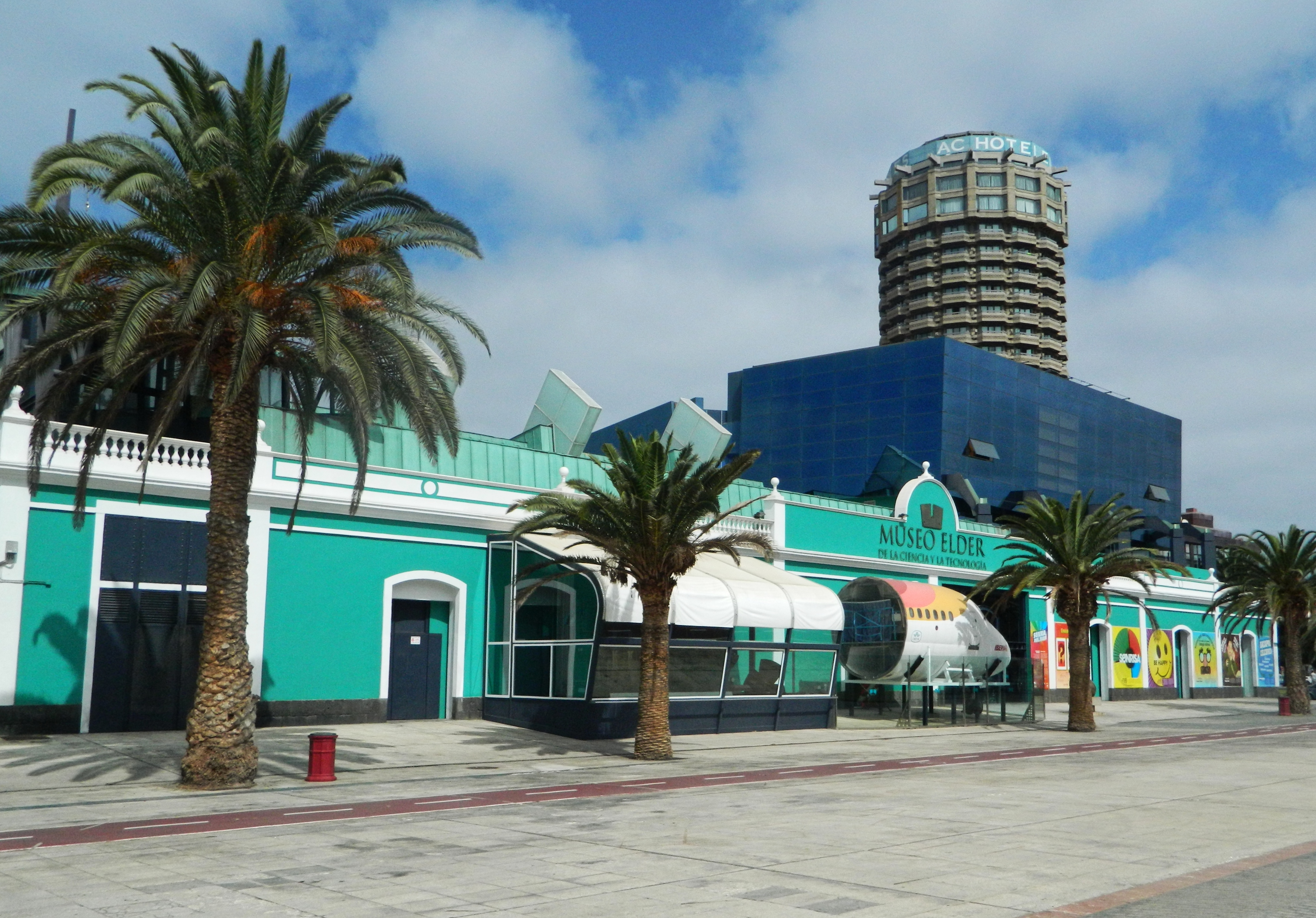 Museum